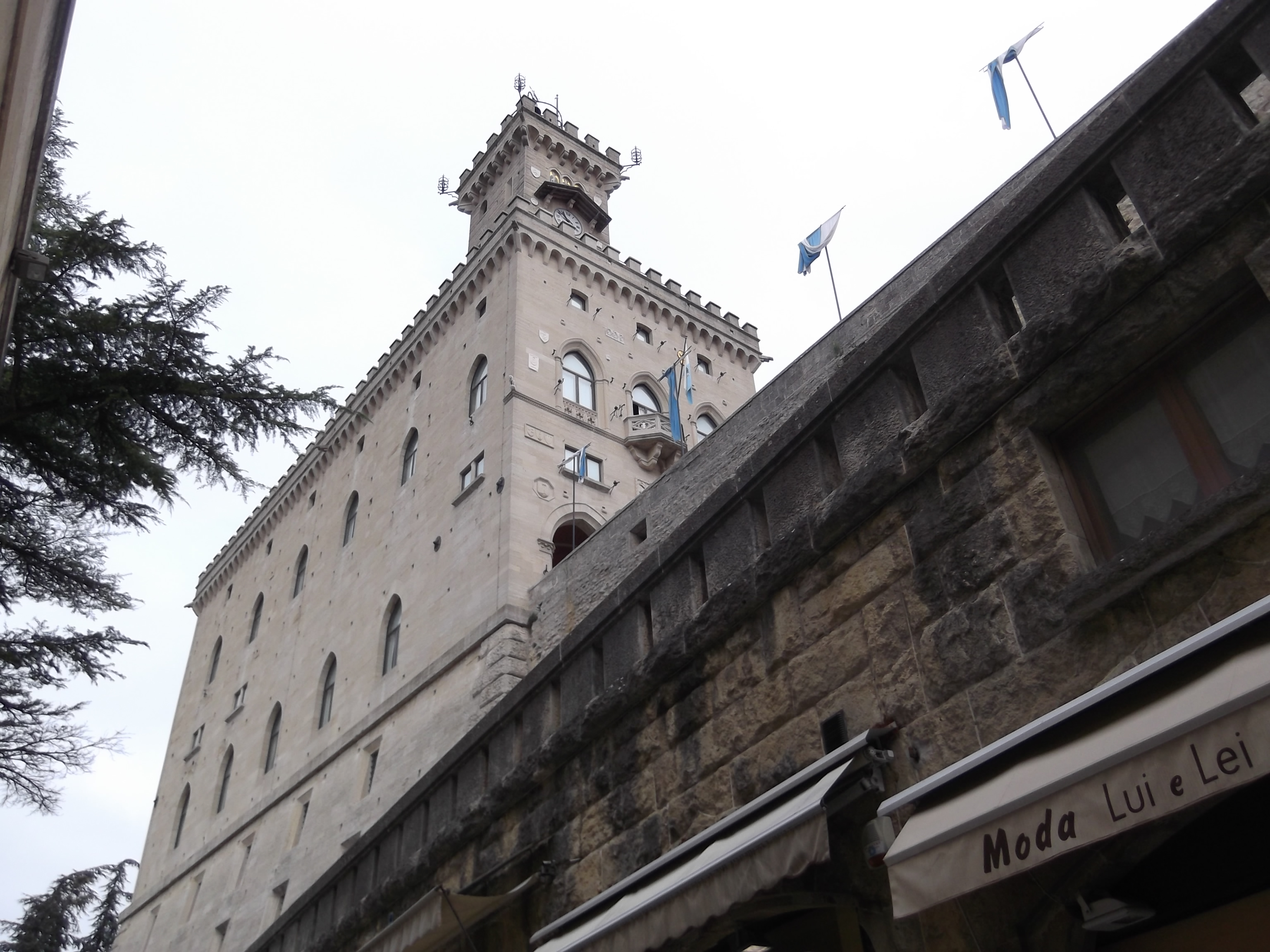 Università della Repubblica di San Marino - Studi Storici, 16, 47890 Città di San Marino, San Marino